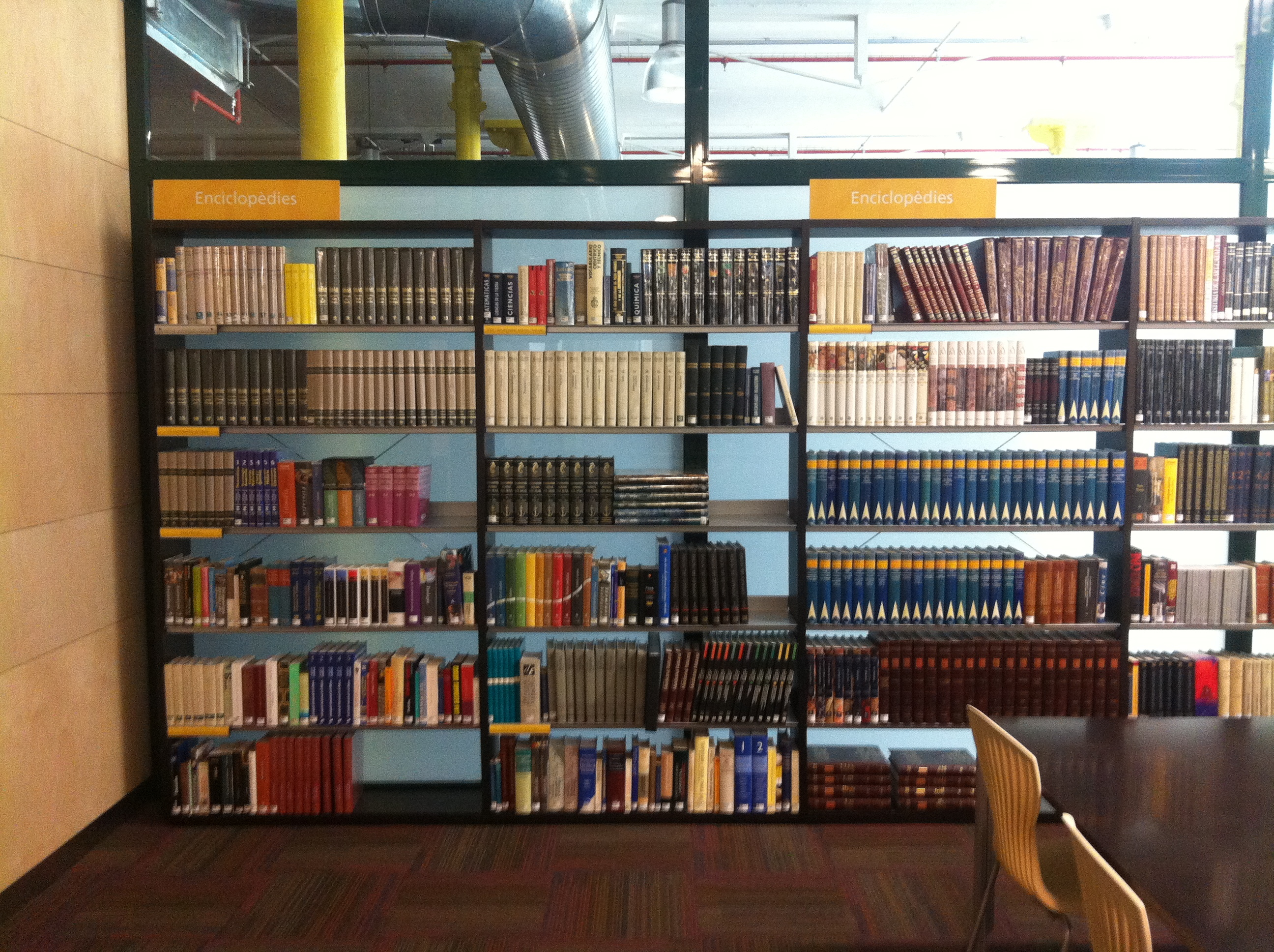 Biblioteca Pública Iu Bohigas